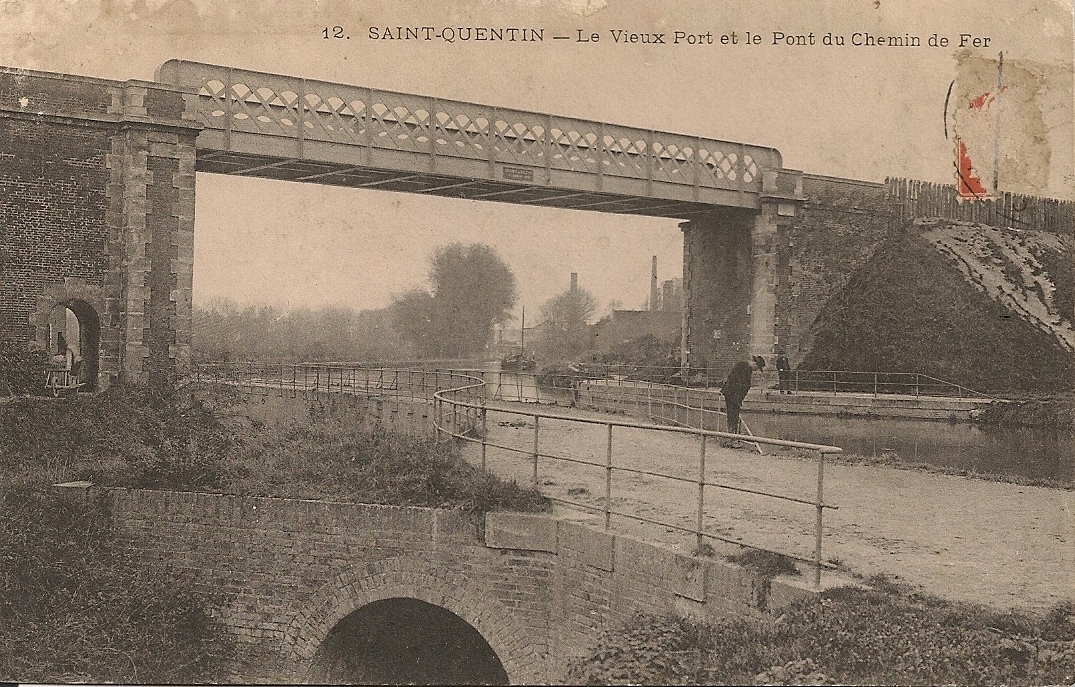 Le pont de Vélu sur le canal